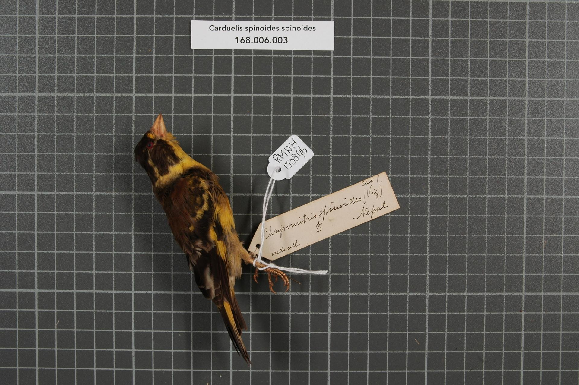 Carduelis spinoides spinoides Vigors, 1831